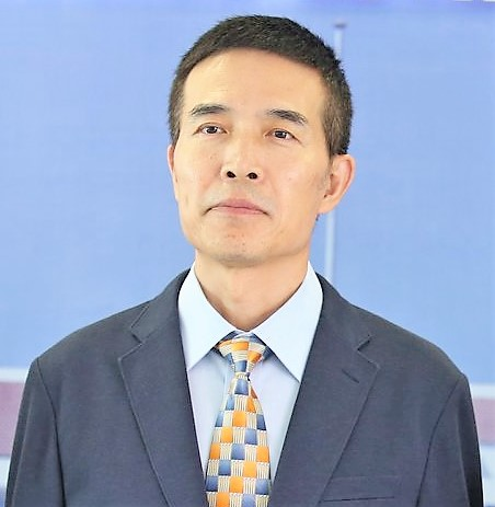 Tetun: Embaxadór Extraordináriu no Plenipotensiáriu Repúblika Popular China iha Timór-Leste Xiao Jianguo